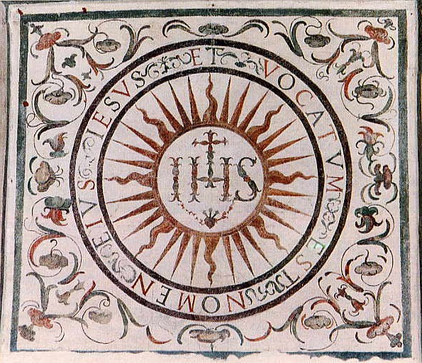 Una de las primeras versiones del sello de la Compañía de Jesús (Iglesia del Gesù, Roma). El trigrama "IHS", comprendido por las tres primeras letras griegas de "IHΣOYΣ" (Jesús), posteriormente interpretado como "Iesus Hominum Salvator", Jesús, Salvador de la Humanidad, "Habemus Iesum Socium", Tenemos a Jesús como compañero o como "Societas Iesu humilis", Compañía del humilde Jesús'.